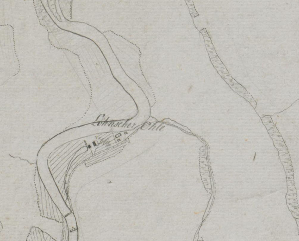 Handrisse (Mensalblätter) zur Karte der Grafschaft Mark von Eversmann um 1795 Ausschnitt Lauenscheiderohl